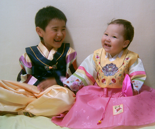 Koreaanse kinderen in hanbok.